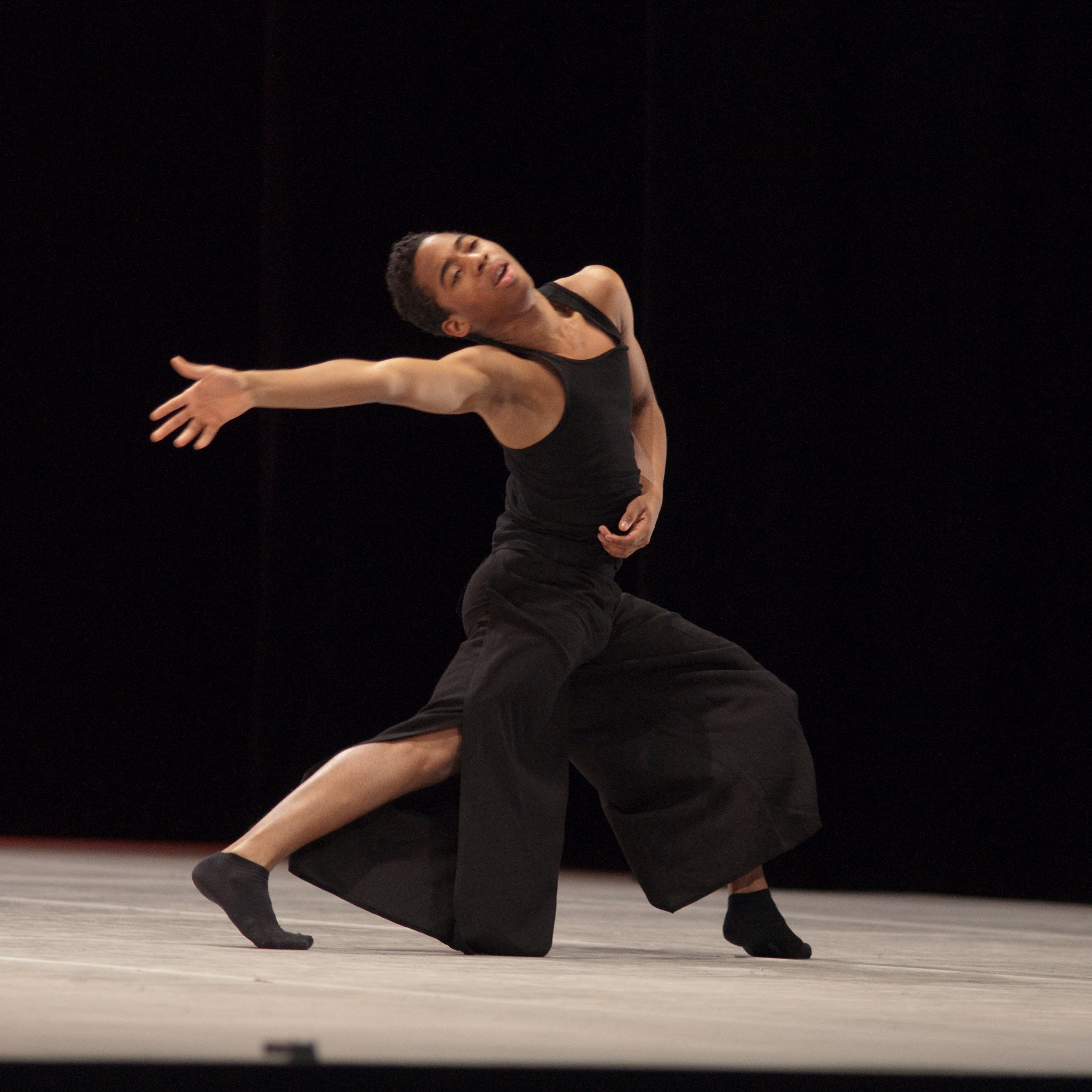 Bailarín en una representación inspirada en la danza posmoderna, enero de 2010. The making of this document was supported by Wikimedia CH. (Submit your project!) For all the files concerned, please see the category Supported by Wikimedia CH.